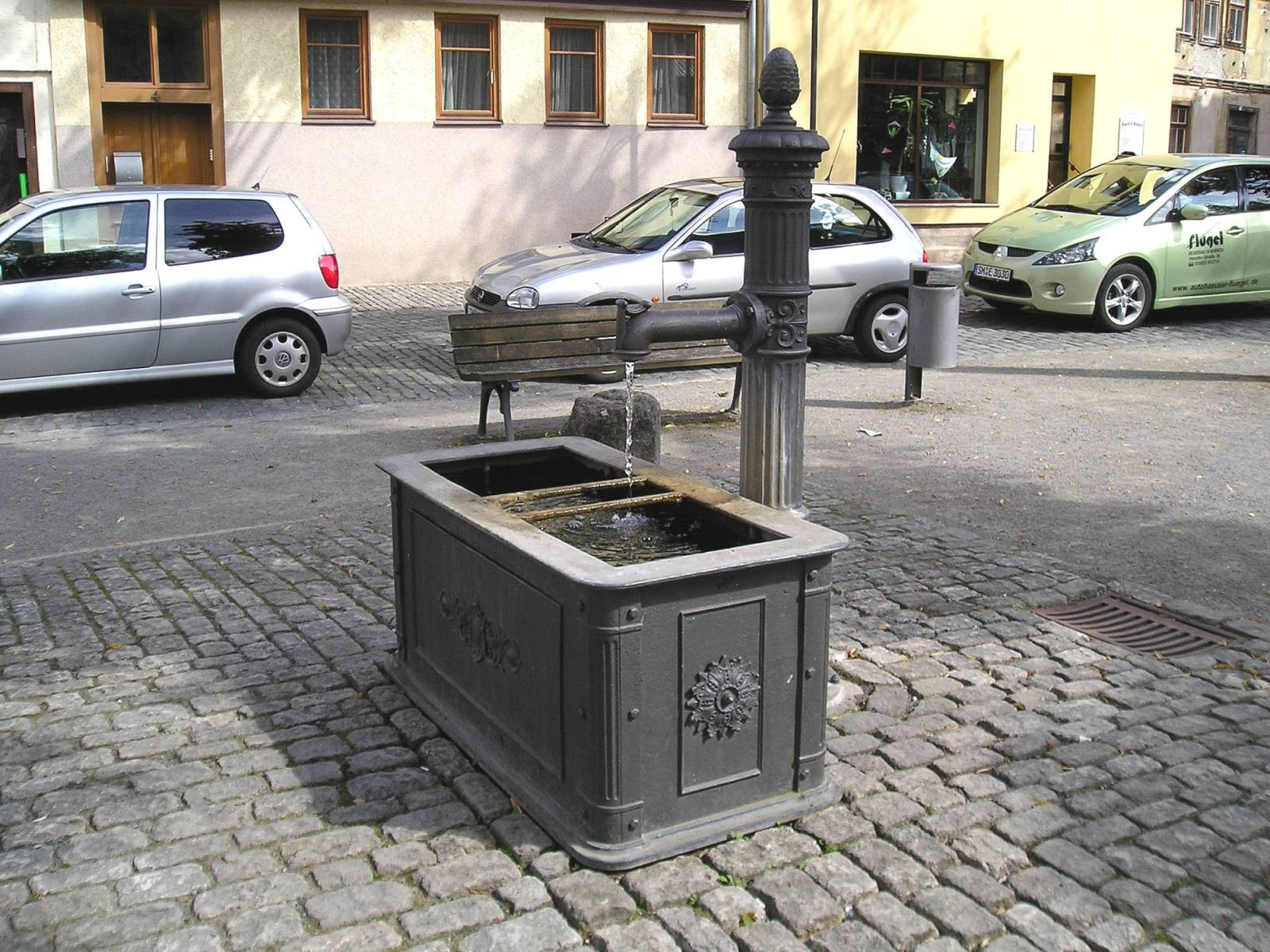 Gusseiserner Laufbrunnen auf dem Töpfemarkt in Meiningen